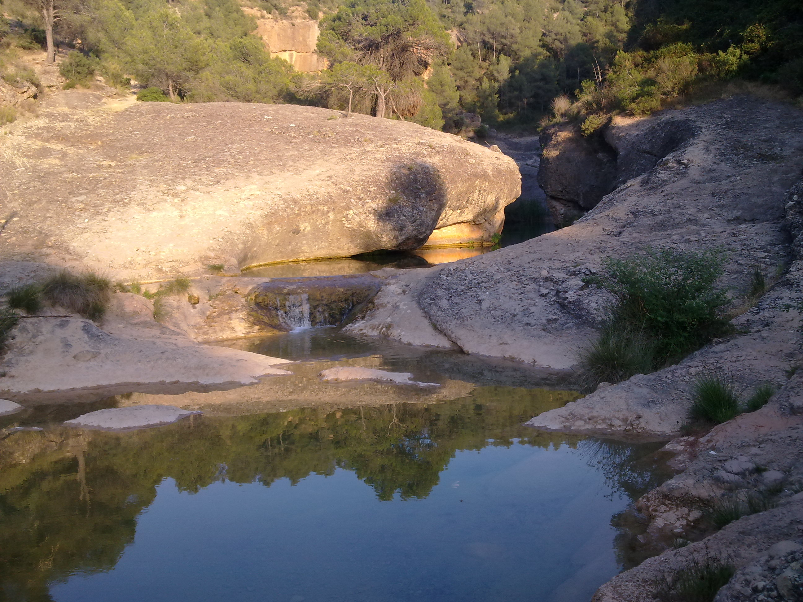 Àrea recreativa de les anomenades Olles de Bot. Estan ubicades al riu Canaletes, entre les poblacions d'Horta de Sant Joan i Bot. (Terra Alta)